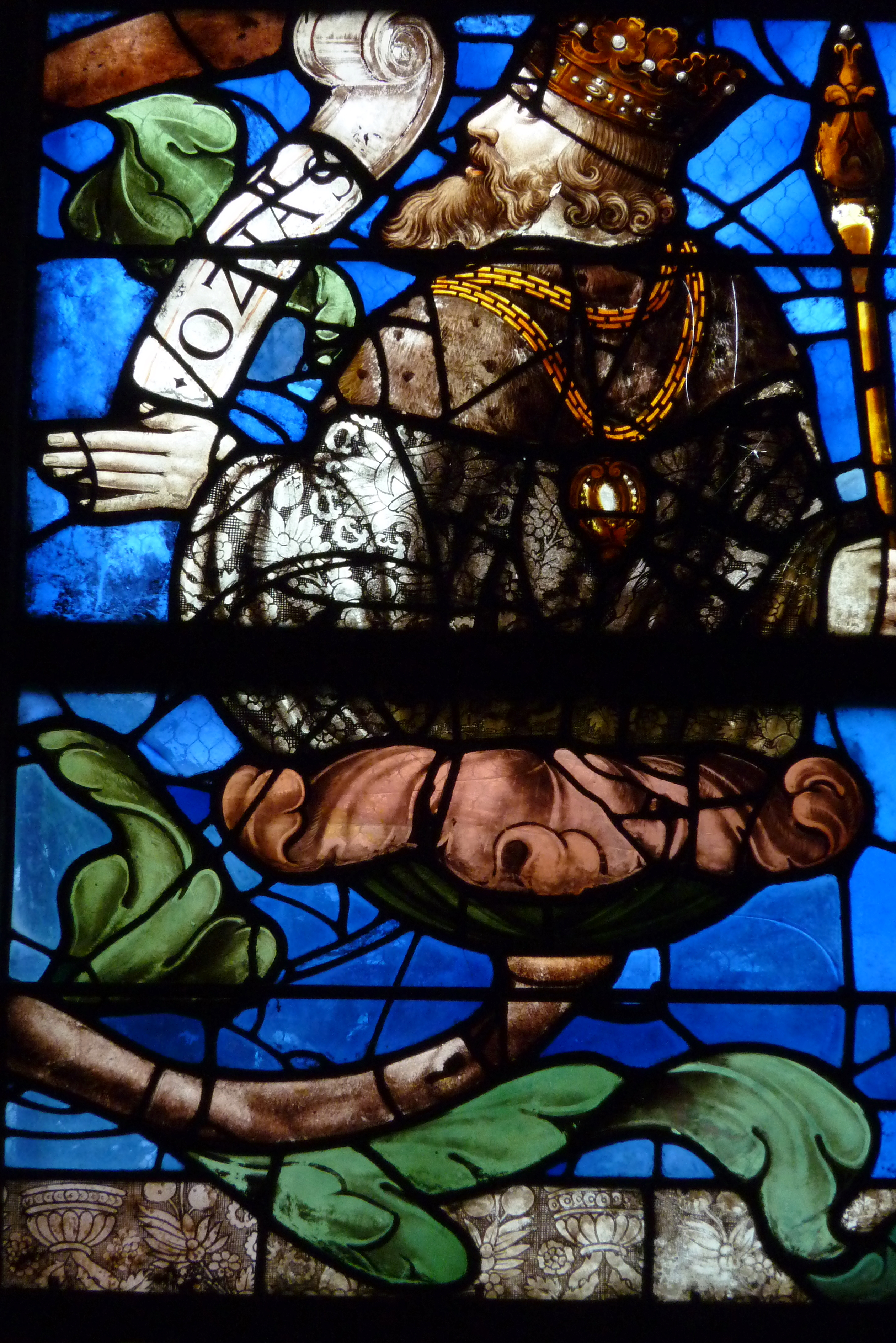 Bleiglasfenster in der katholischen Pfarrkirche Saint-Martin in Groslay, Darstellung: Wurzel Jesse mit Ausschnitt: Josia